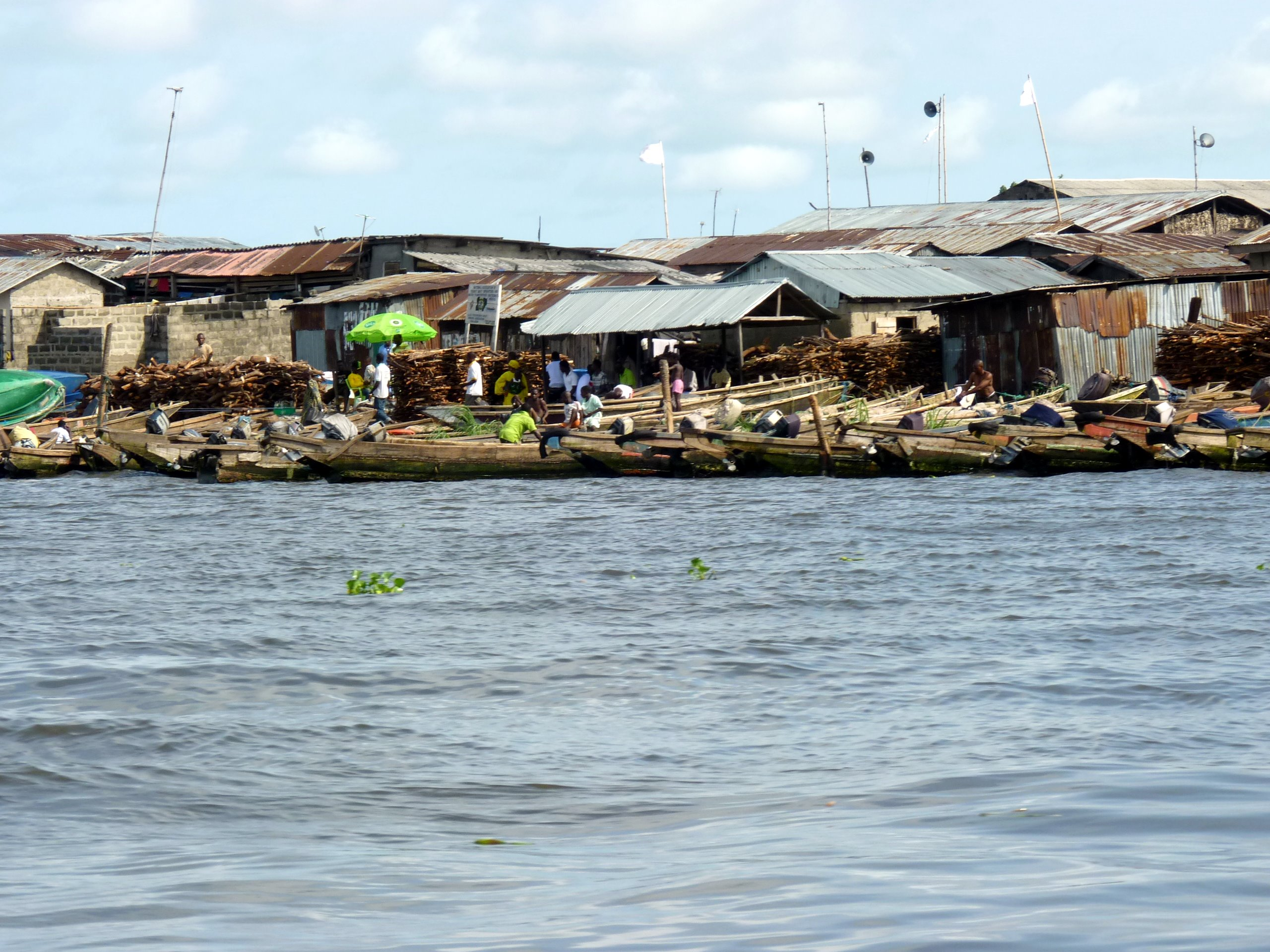 Lagos. Foto: Rainer Wozny